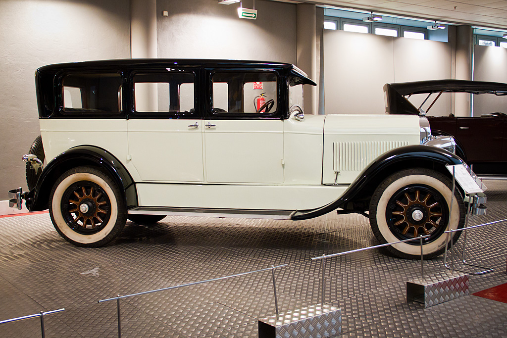 Museo de Historia de la Automoción de Salamanca CHRYSLER IMPERIAL SERIE 80 Wiki Loves Art Fotografía: Juan Miguel Ávila del Arco | Darco TT Canon EOS 7D | Objetivo EF-S18-135mm f/3.5-5.6 IS f/5.0 | 1/25 | ISO1000 Marca: CHRYSLER Modelo: IMPERIAL SERIE 80 Año: 1927 Cilindrada: 4.725 cc Potencia: 92 CV Carrocería: SEDÁN 4 PUERTAS Frenos: HIDRÁULICOS El Chrysler imperial es un vehículo que por su elegancia y majestuosidad era considerado el vehículo representativo de las altas esferas sociales de la época, tal es así que se engloba dentro de la categoría FULL CLASSIC según el Car Club of America. Fue uno de los primeros modelos de lujo construidos en serie, de tal manera que se consiguieron fabricar hasta 48.254 unidades entre 1927 y 1928 Museo de Historia de la Automoción de Salamanca Automóvil cedido por Marinduque, S.L.